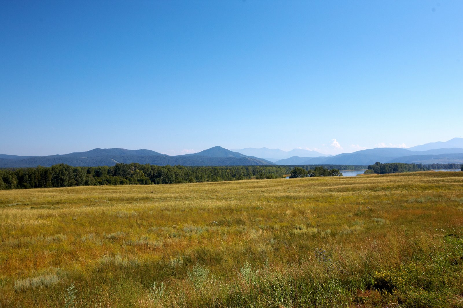 Abakan